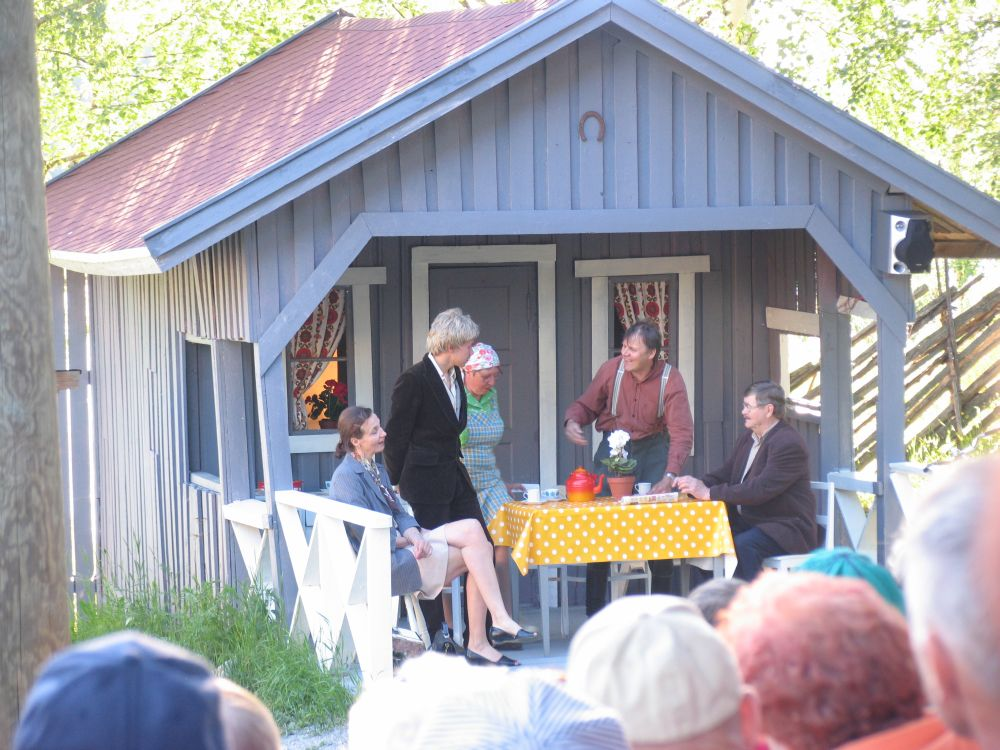 Vuokonjarvi summer theatre Juuka Finland